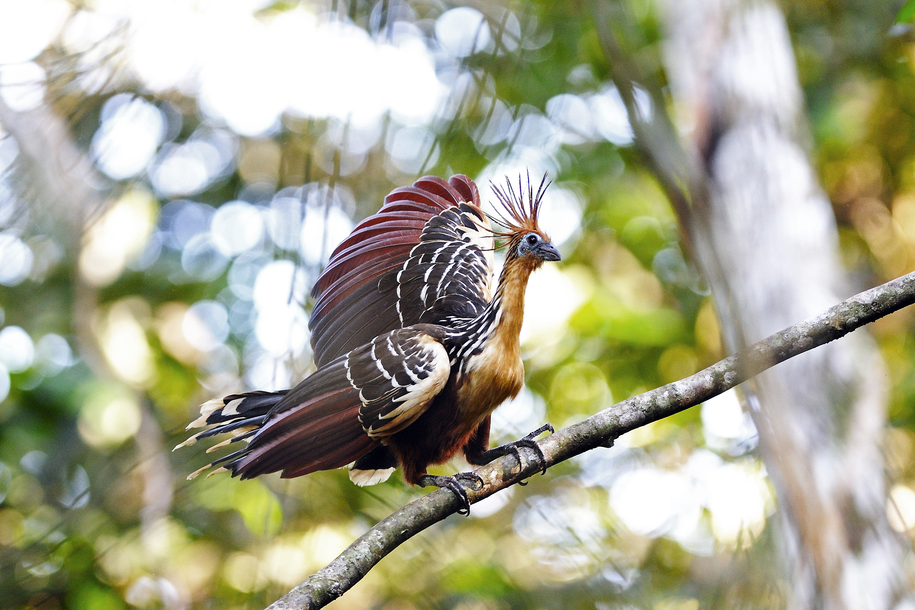 Opisthocomus Hoazin 70 cm